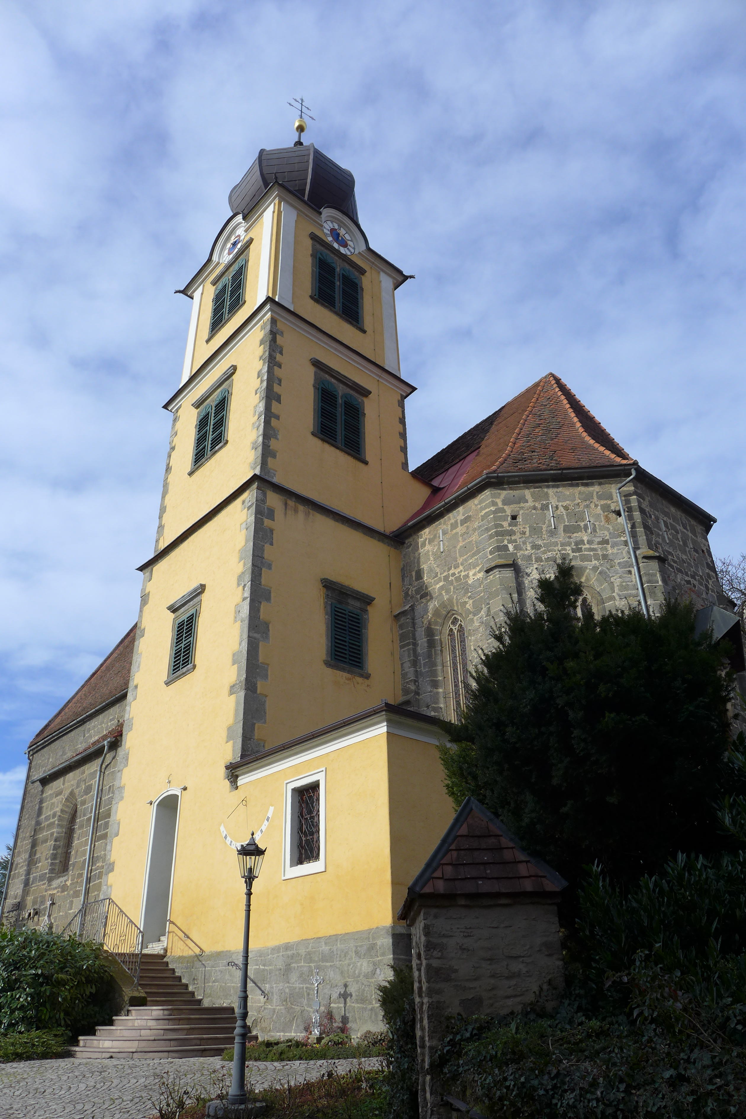 Riegersburg Pfarrkirche Außenansicht